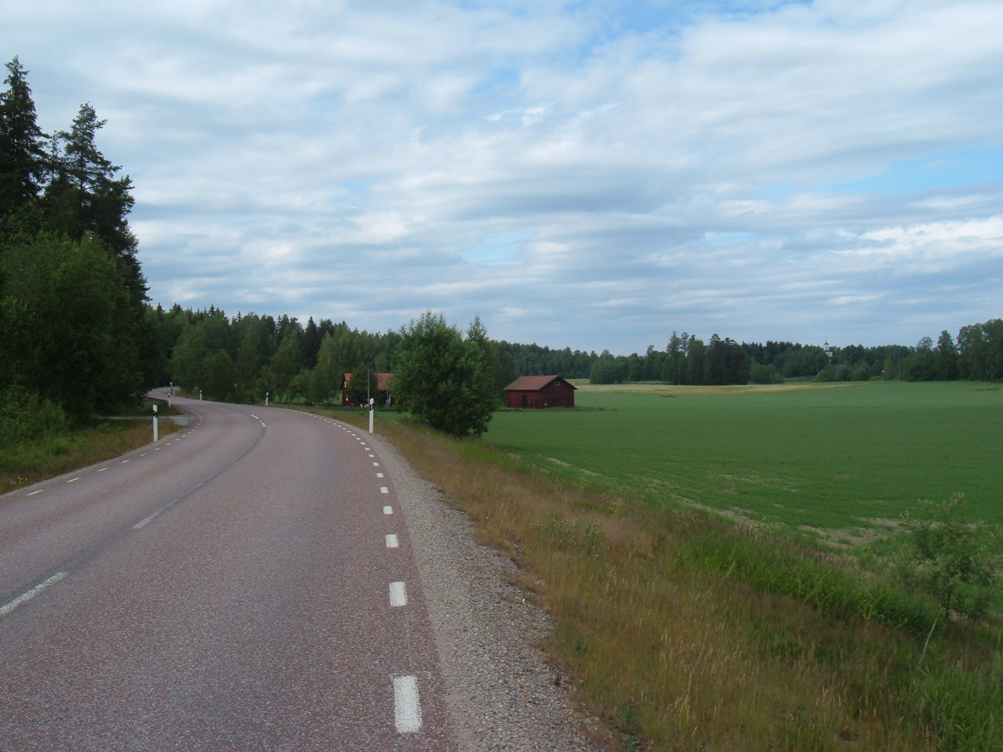 Länsväg 250 vid Gunnilbo, kyrkan syns i bakgrunden.